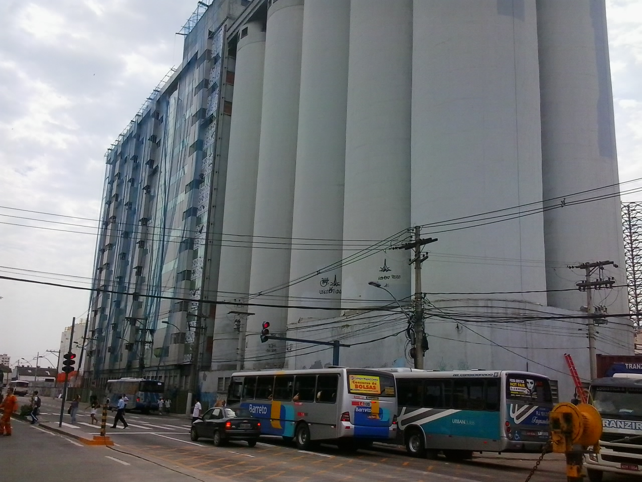 Edifício do antigo Moinho Fluminense, zona portuária de Niterói. O prédio passa no momento por um refit para se transformar em um edifício de escritórios.